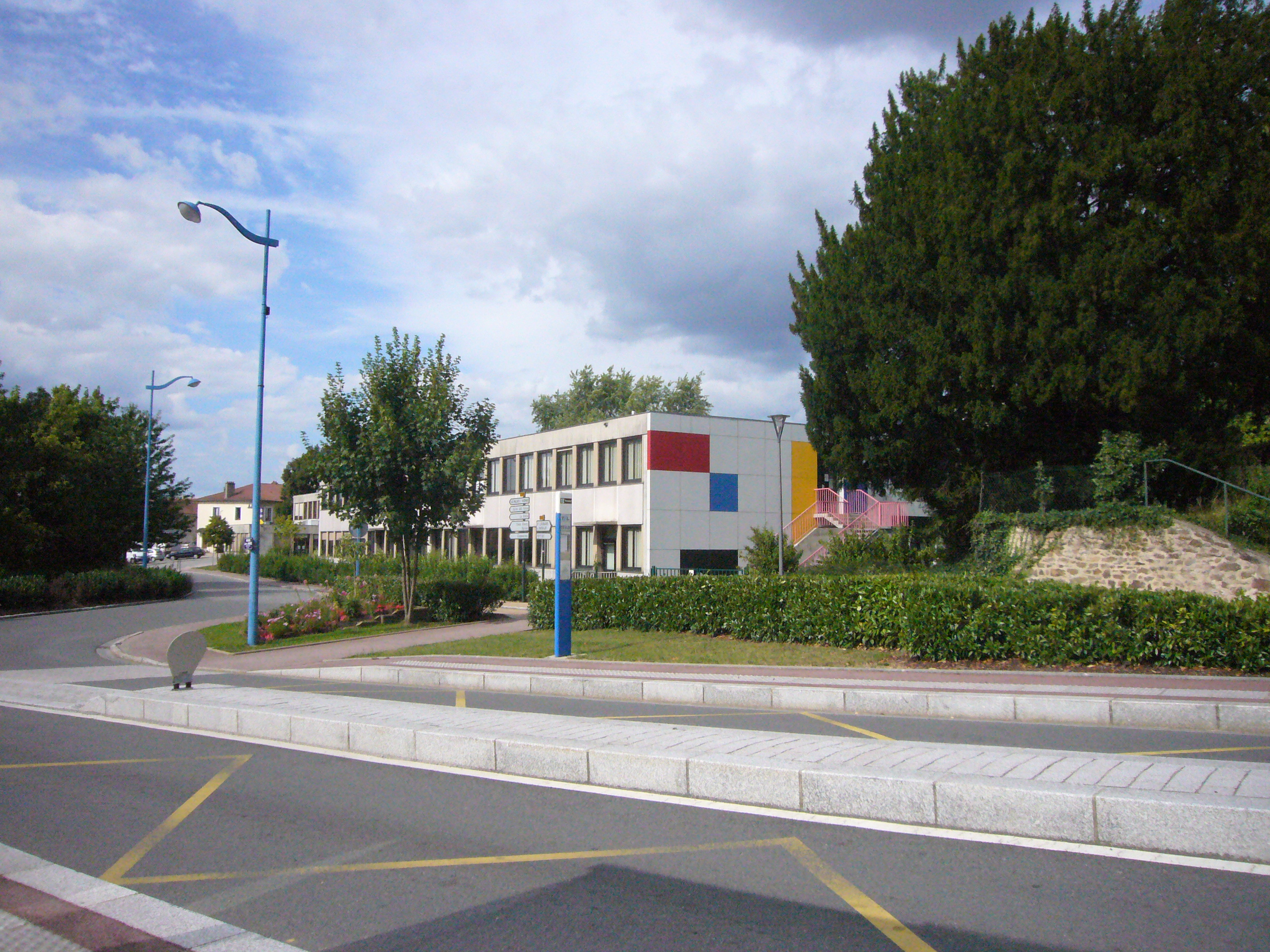 École élémentaire Turgot-Jean Jaurès de Panazol (Haute-Vienne)